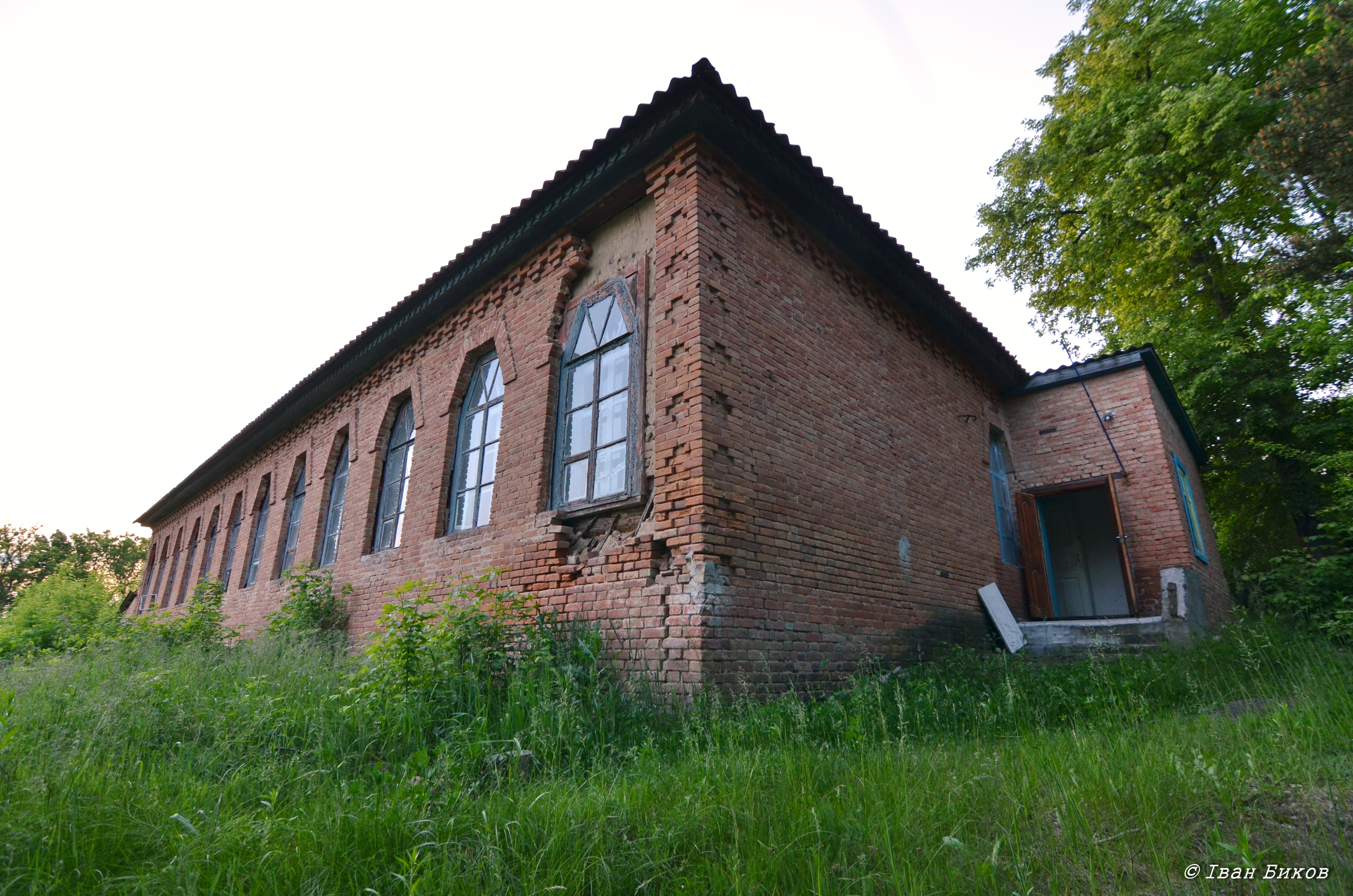 Збудована Лохвицьким земством за проектом Опанаса Сластіона. Трикомлектна ( трикласна). Має стриманий цегляний декор. Зараз споруду орендує монастир.